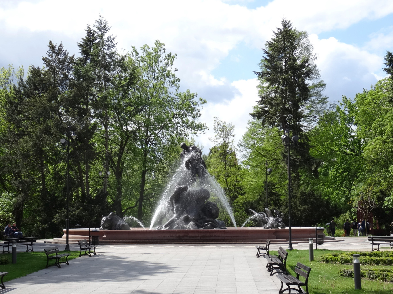 Fontanna Potop w Bydgoszczy (Ferdinand Lepcke, 1904-1943) zrekonstruowana w latach 2006-2014